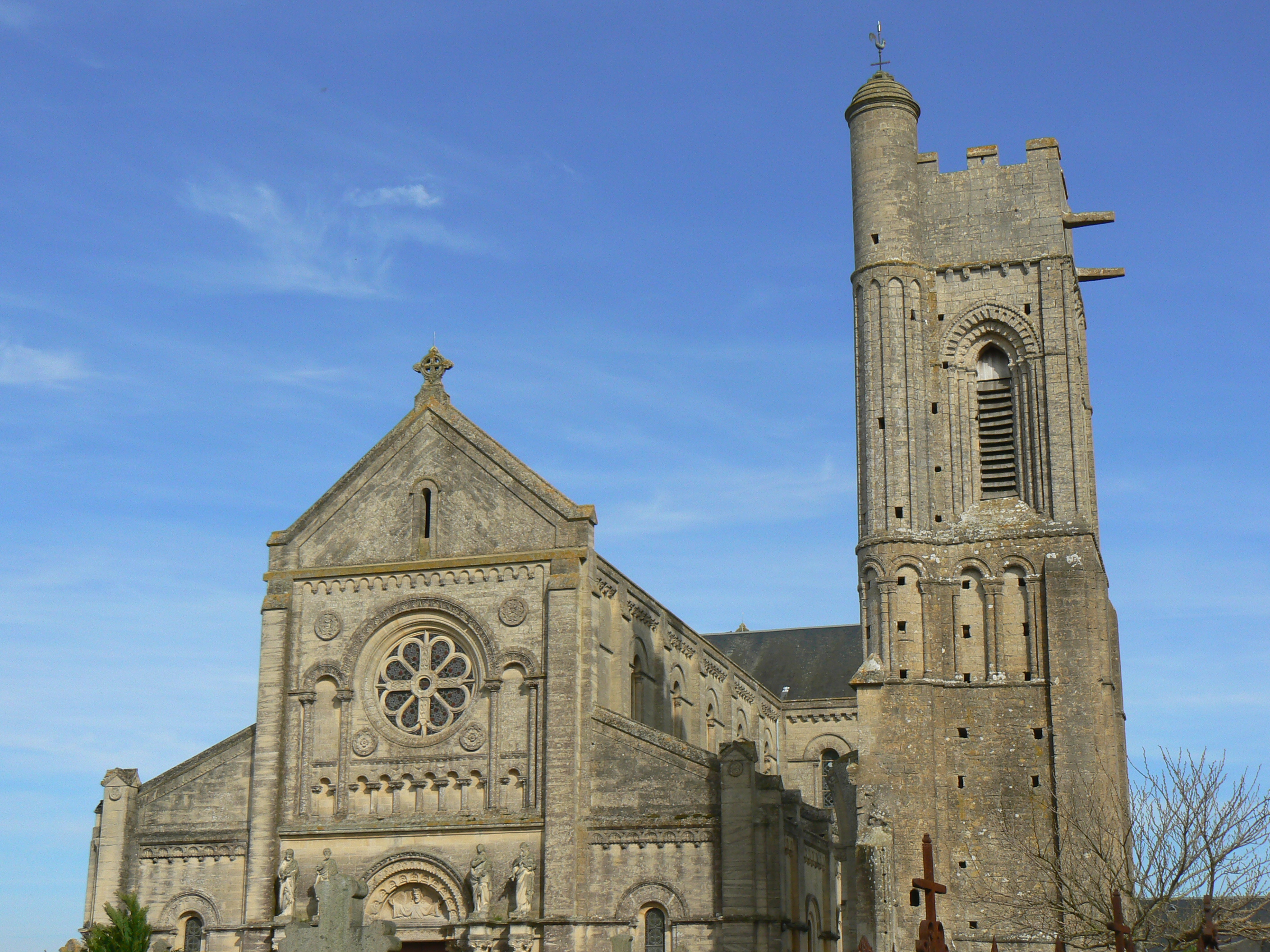 Paroisse st regnobert, église saint Quentin (XIIe siècle) luc sur mer